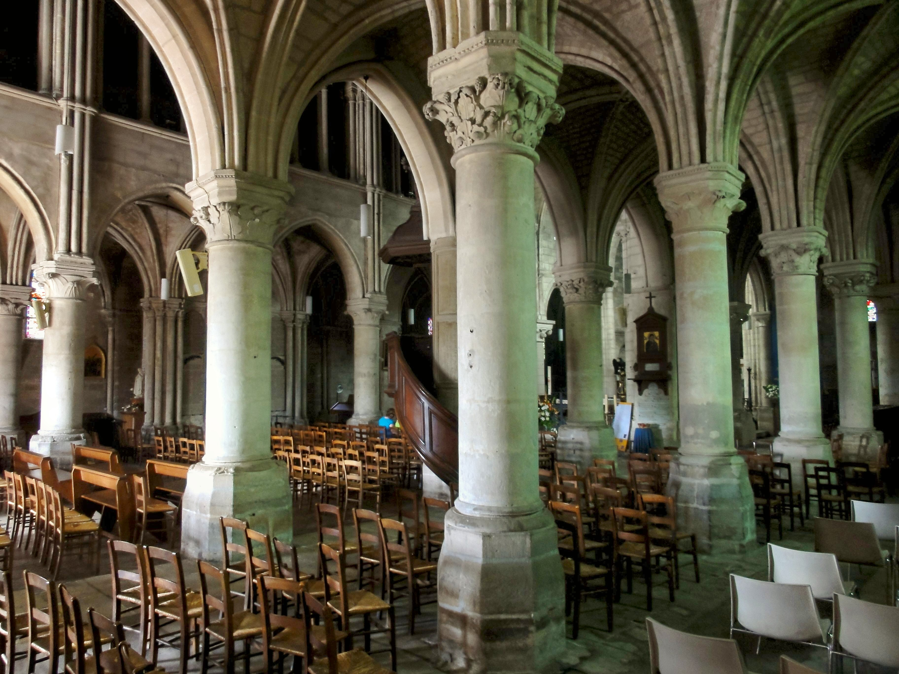 Double bas-côté sud.